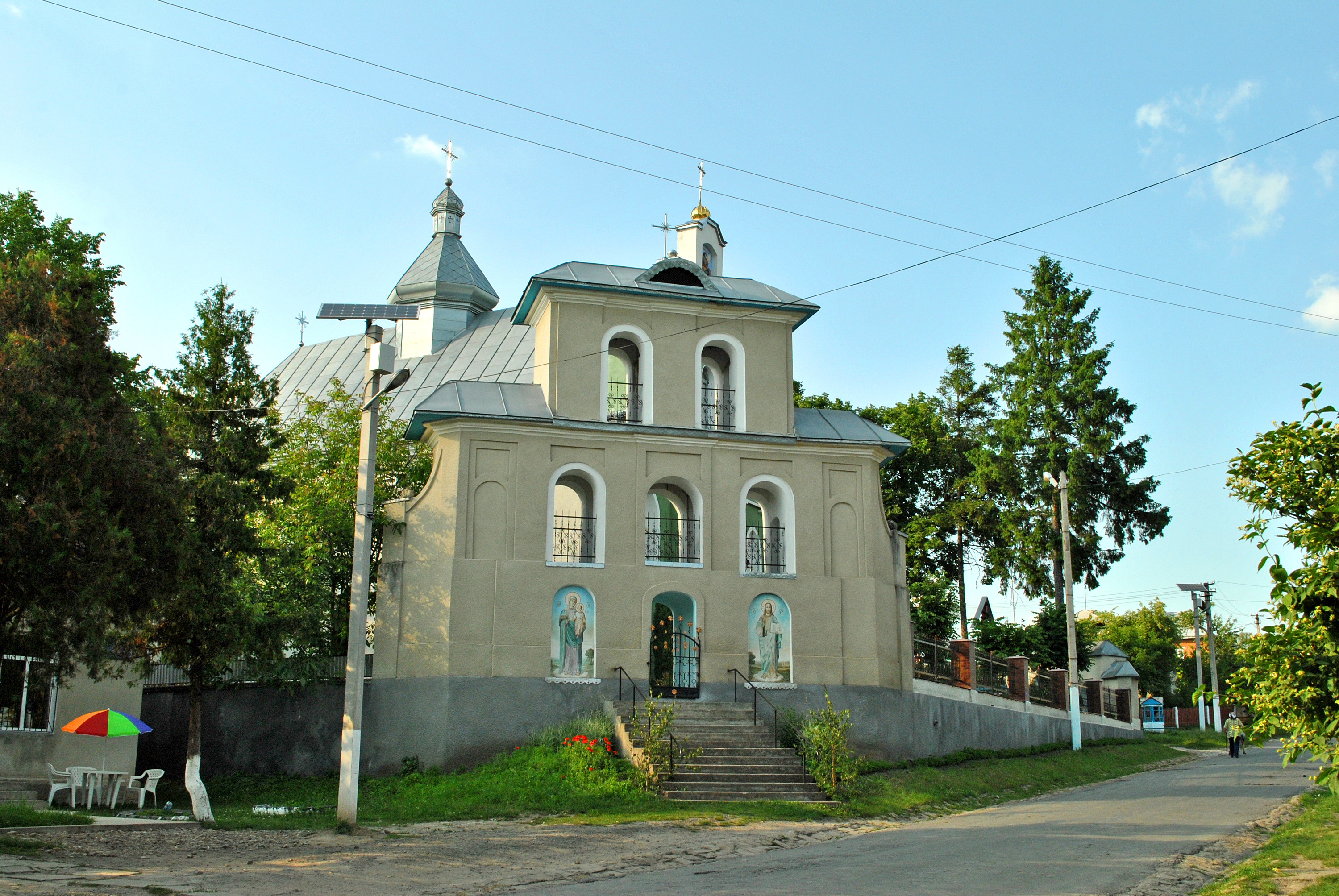 Церква Чуда святого Архістратига Михаїла в Хонах у с Зубреці Бучацького району Тернопільської області.